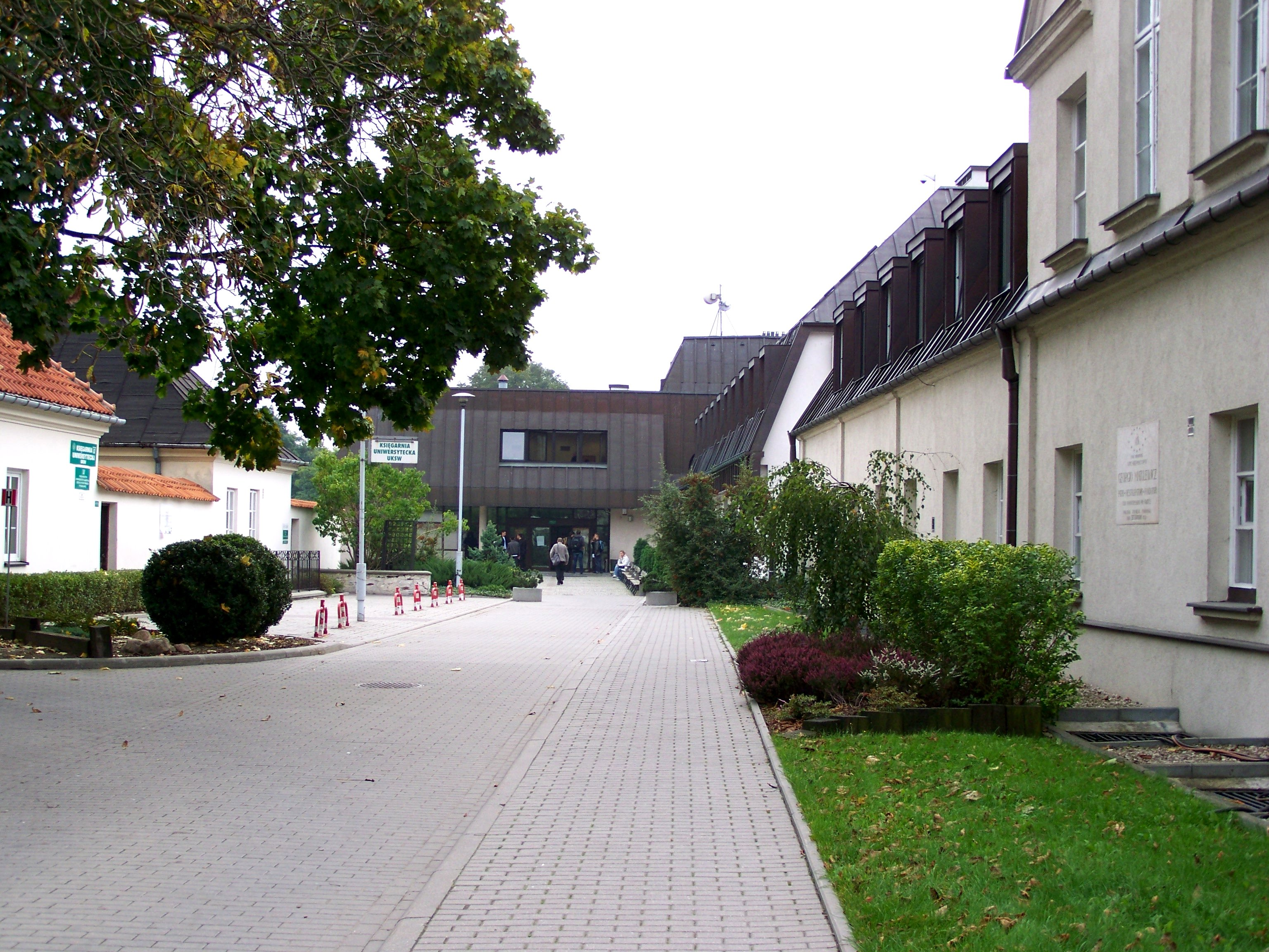 Wejście do nowego budynku UKSW na warszawskich Bielanach przy ulicy Dewajtis